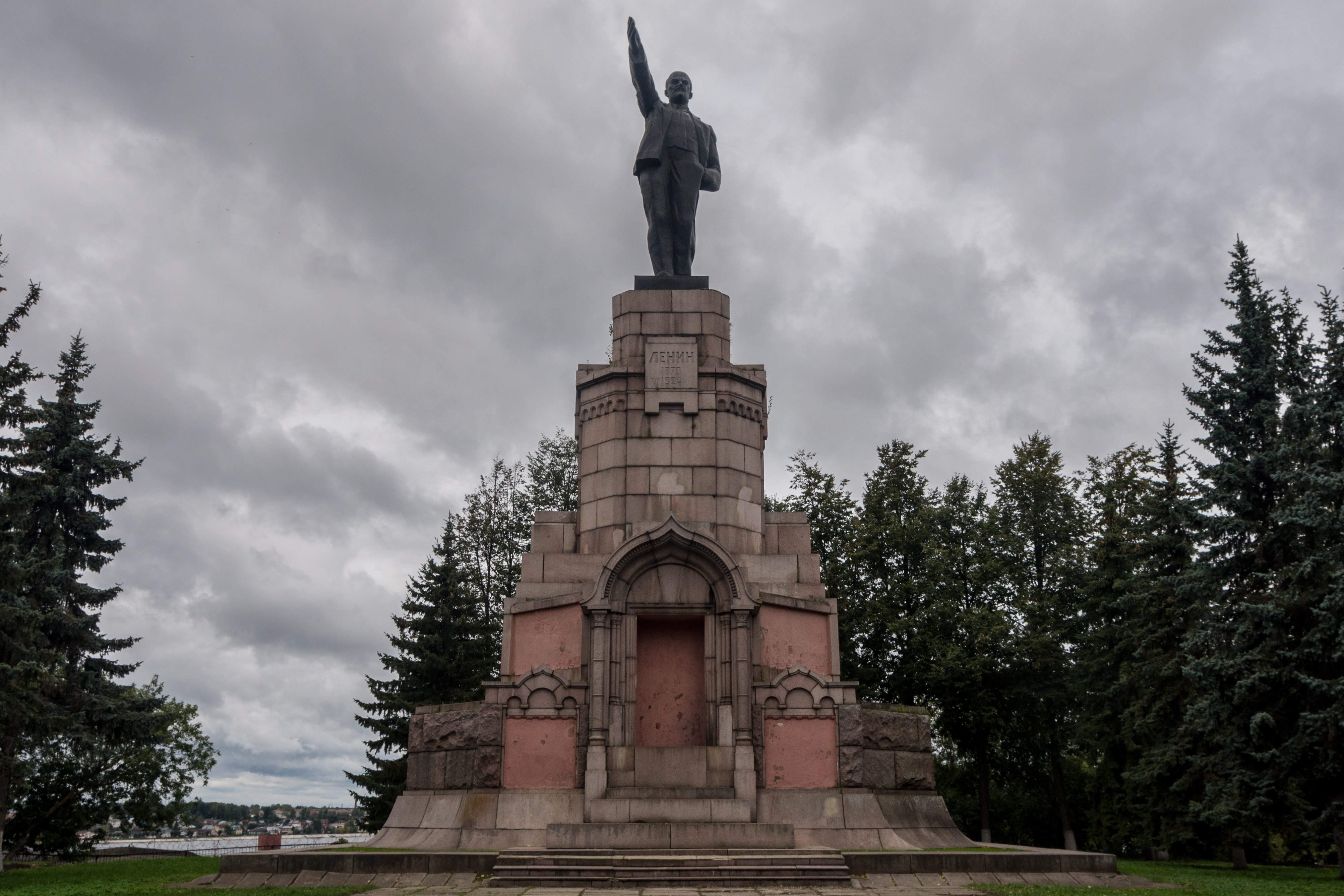 Памятник В.И. Ленину: ПКО, Кострома, Костромская область